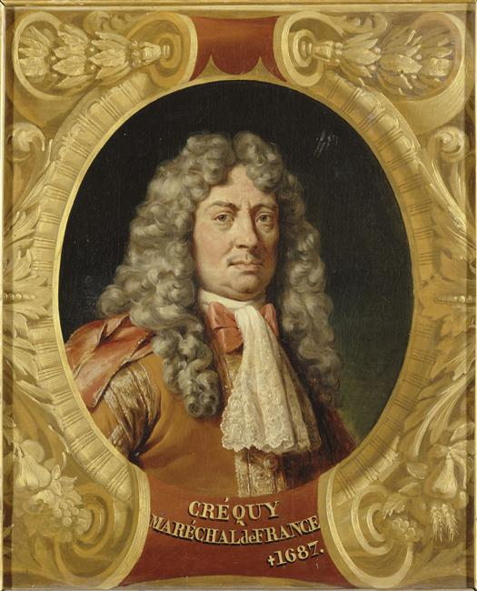 François de Blanchefort, marquis de Créquy (1629-1687), maréchal de France en 1668